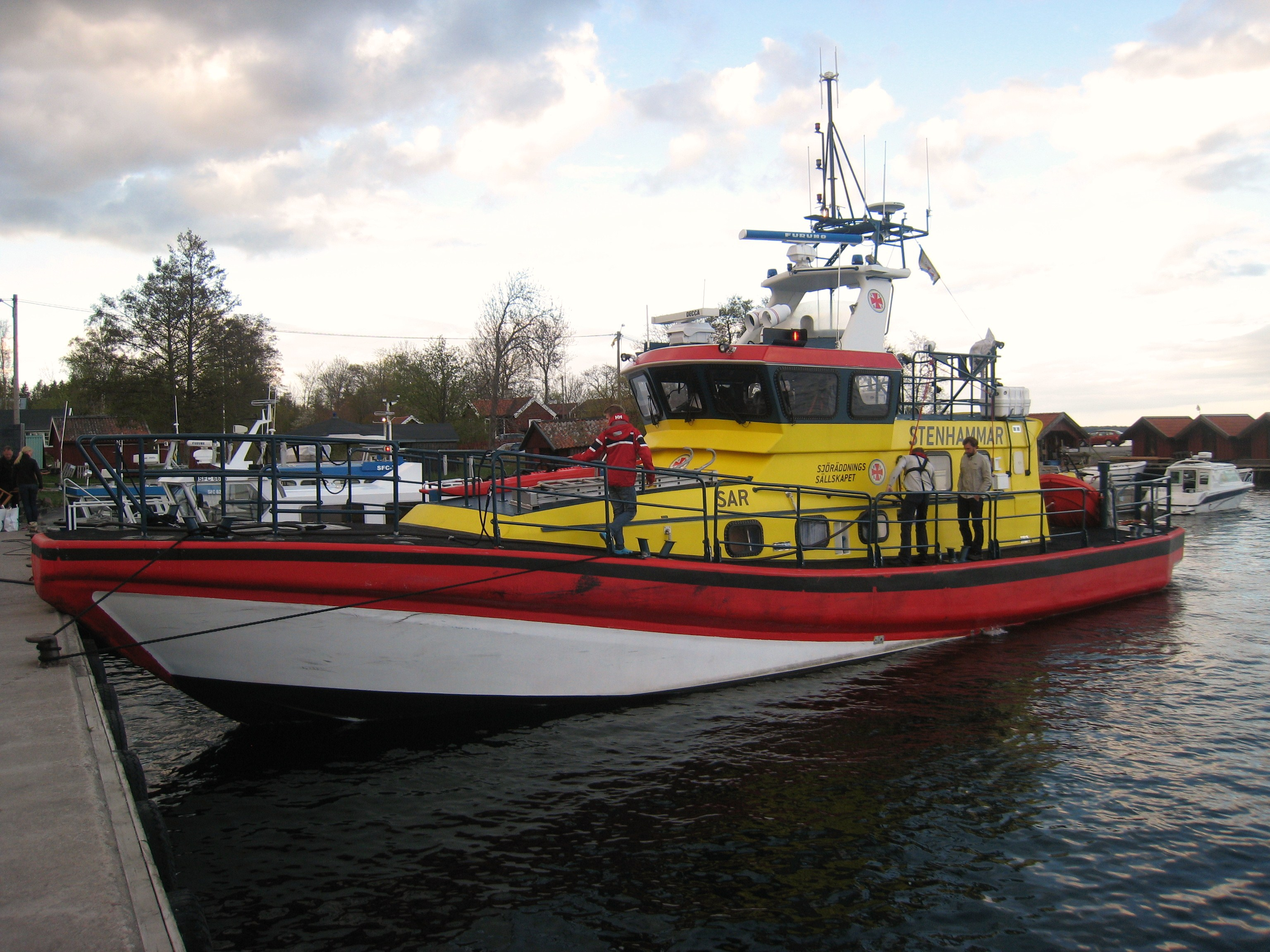 Räddningsfartyget Rescue Stenhammar med hemmahamn Räfsnäs brygga i Stockholms norra skärgård